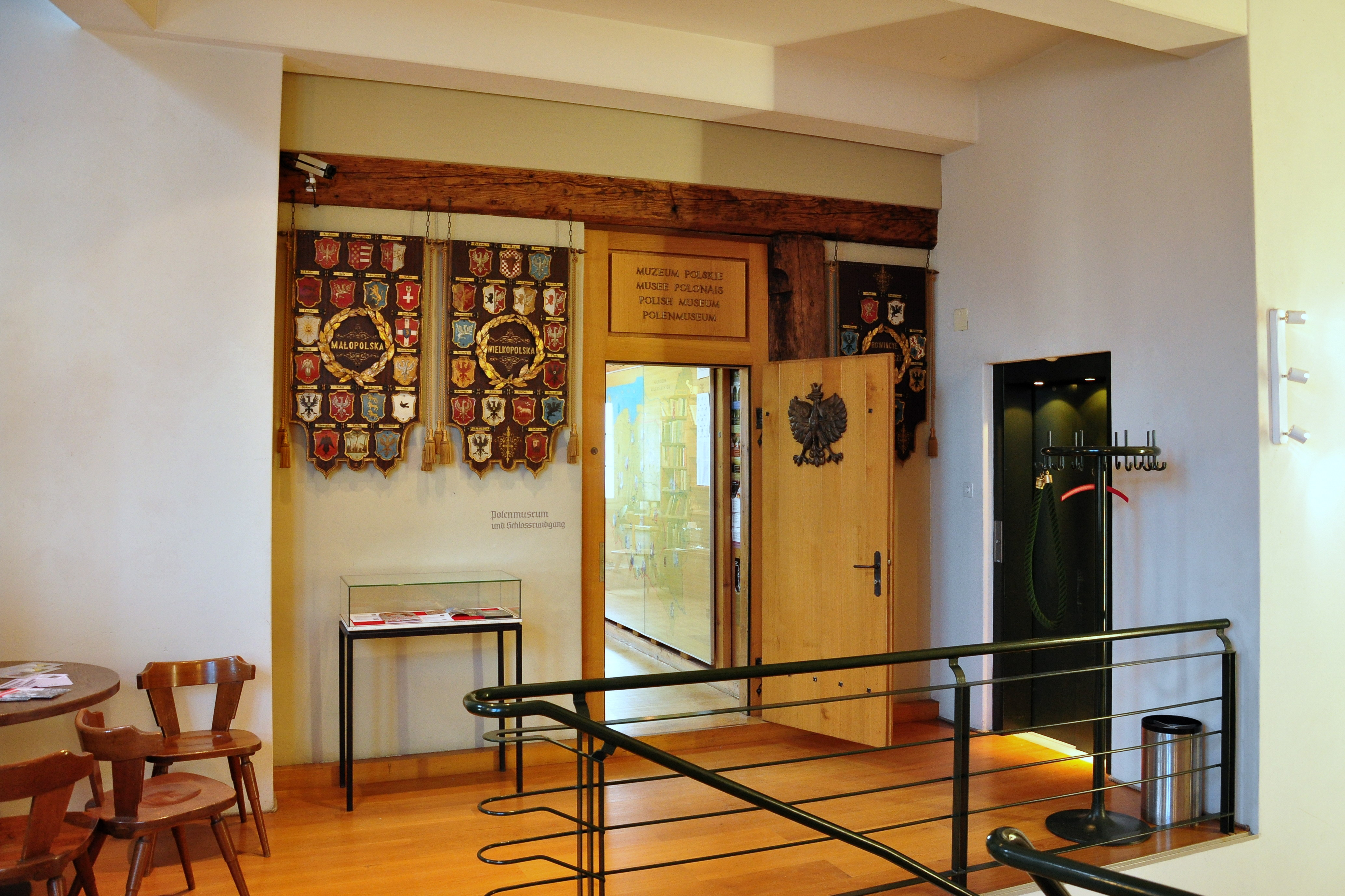 Muzeum Polskie, Schloss (castle) in Rapperswil (Switzerland)